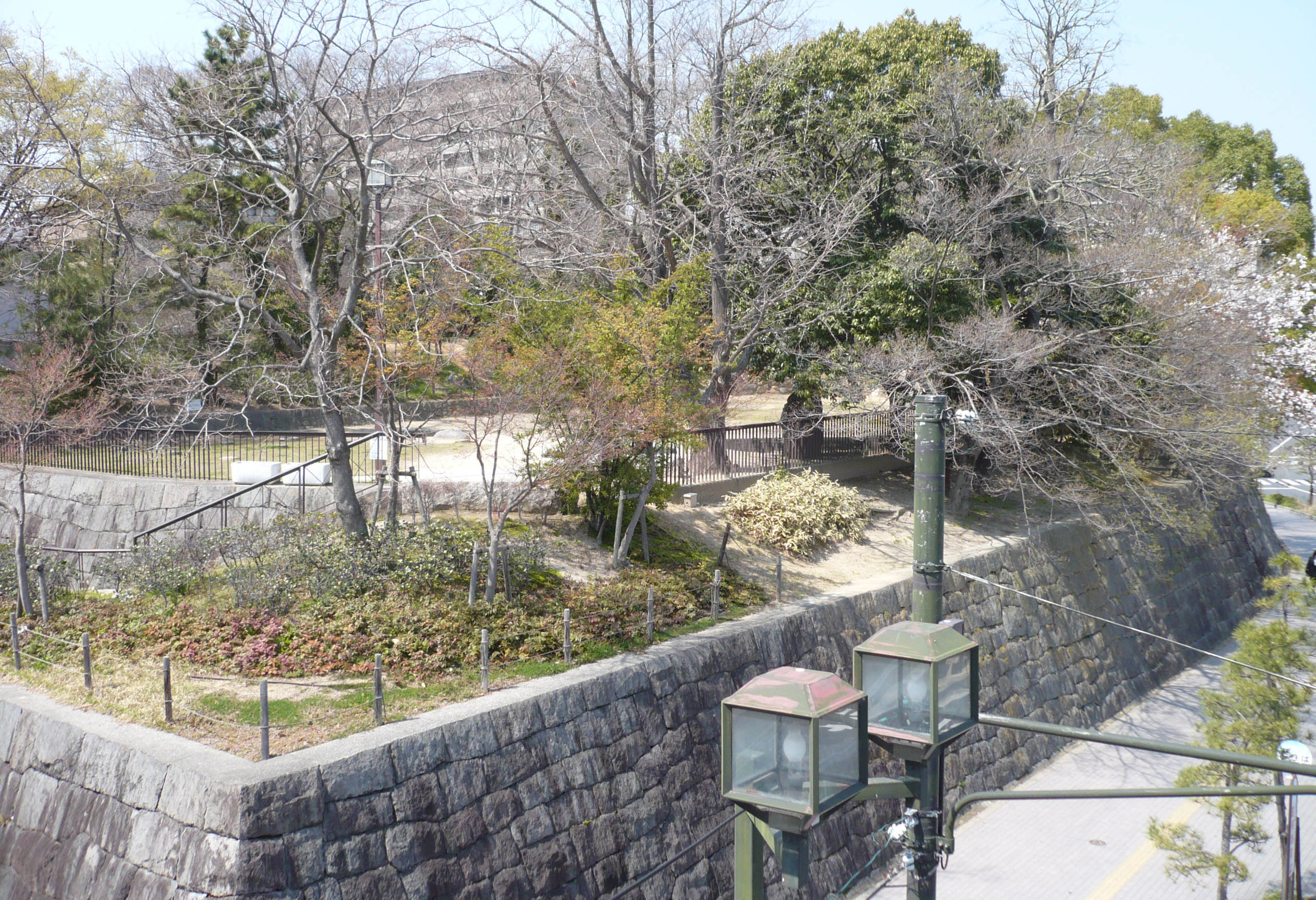 伊丹城の模擬砦